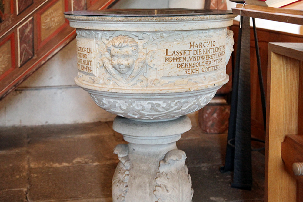 Taufbecken in der Dorfkirche Wallroda